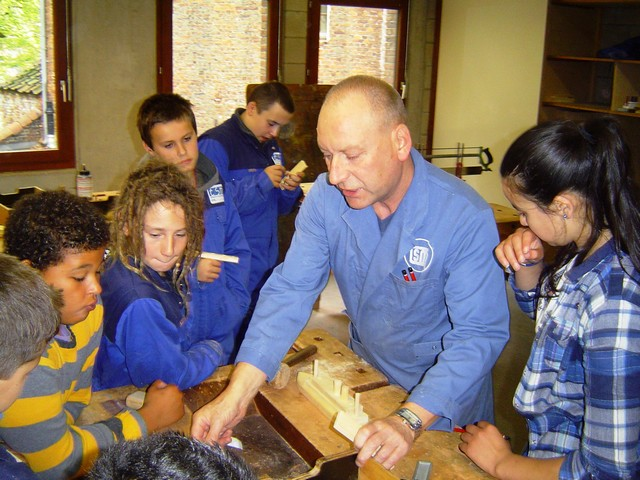 Leraar bezig in TSM Middenschool